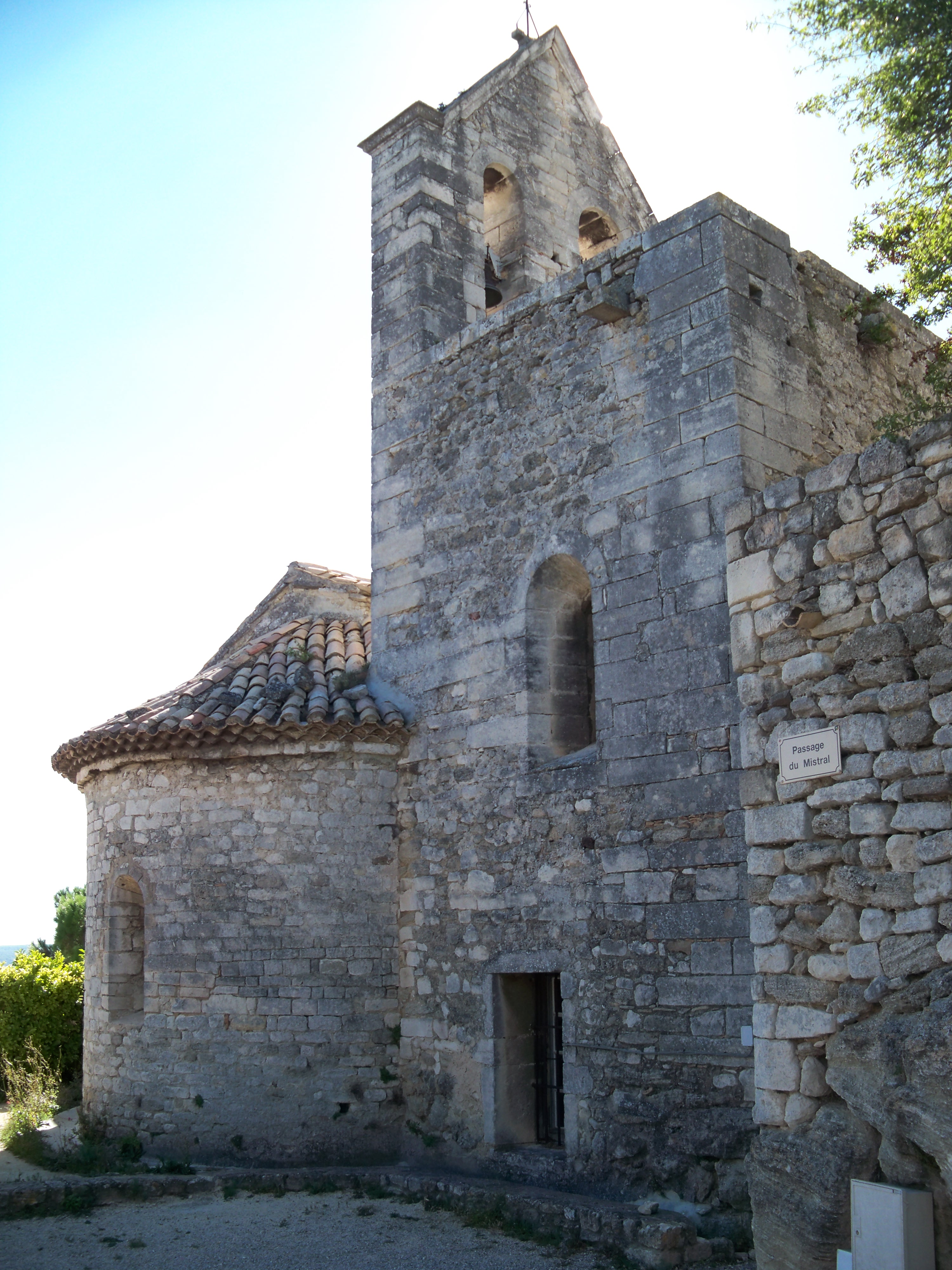 abside de l'église de Clansayes (26) .